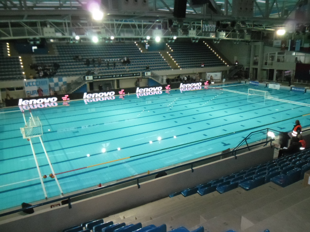 bazen Juga u Gružu pred euroligašku utakmicu s Pro Reccom (8:7) 29. siječnja 2014.